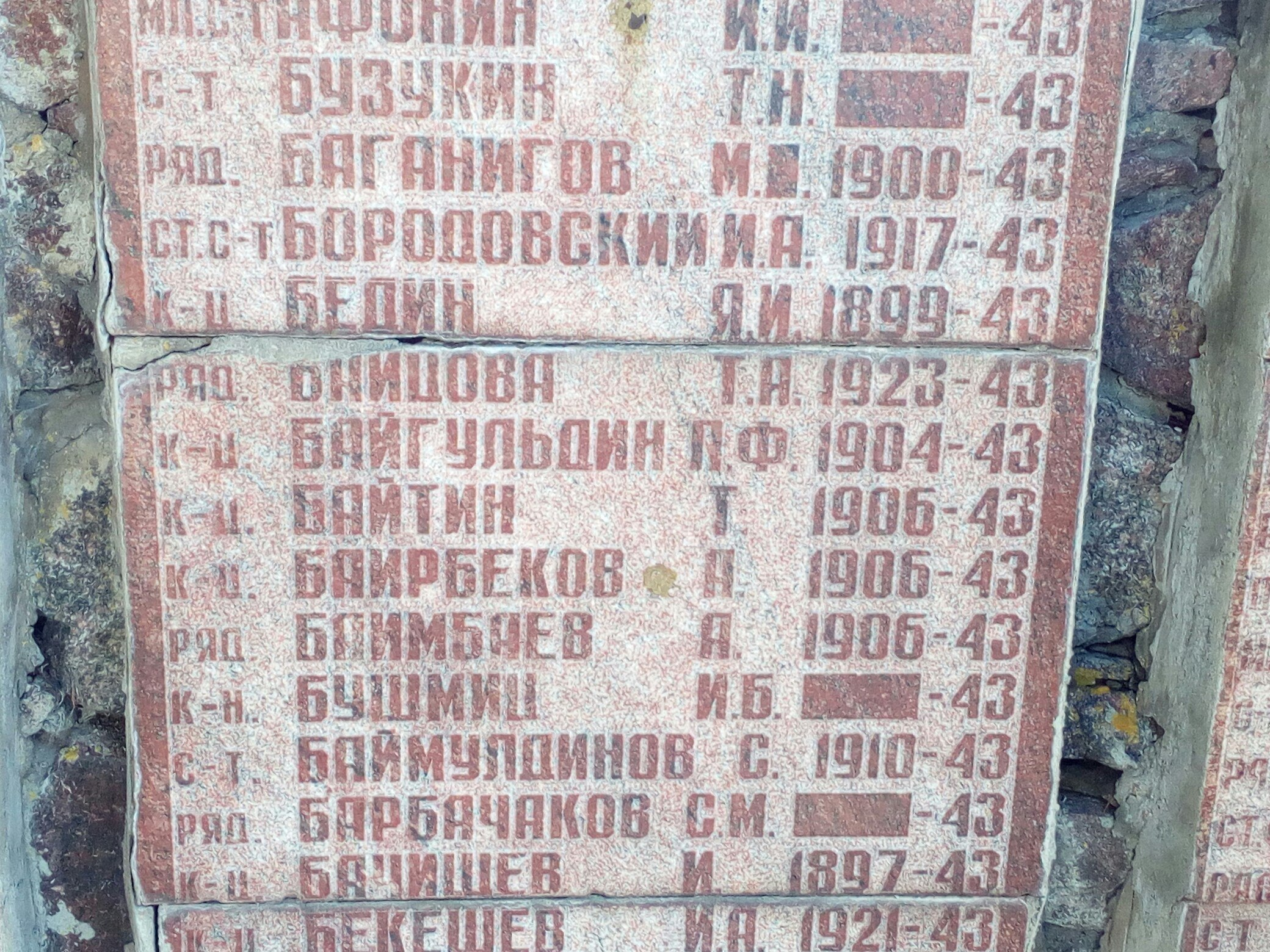 Мемориал «Память» который воздвигнут на месте братской могилы № 305 и посвящён освободителям села от вермахта в ВОВ. Село Кочетовка, Хохольский район, Воронежская область, Россия.